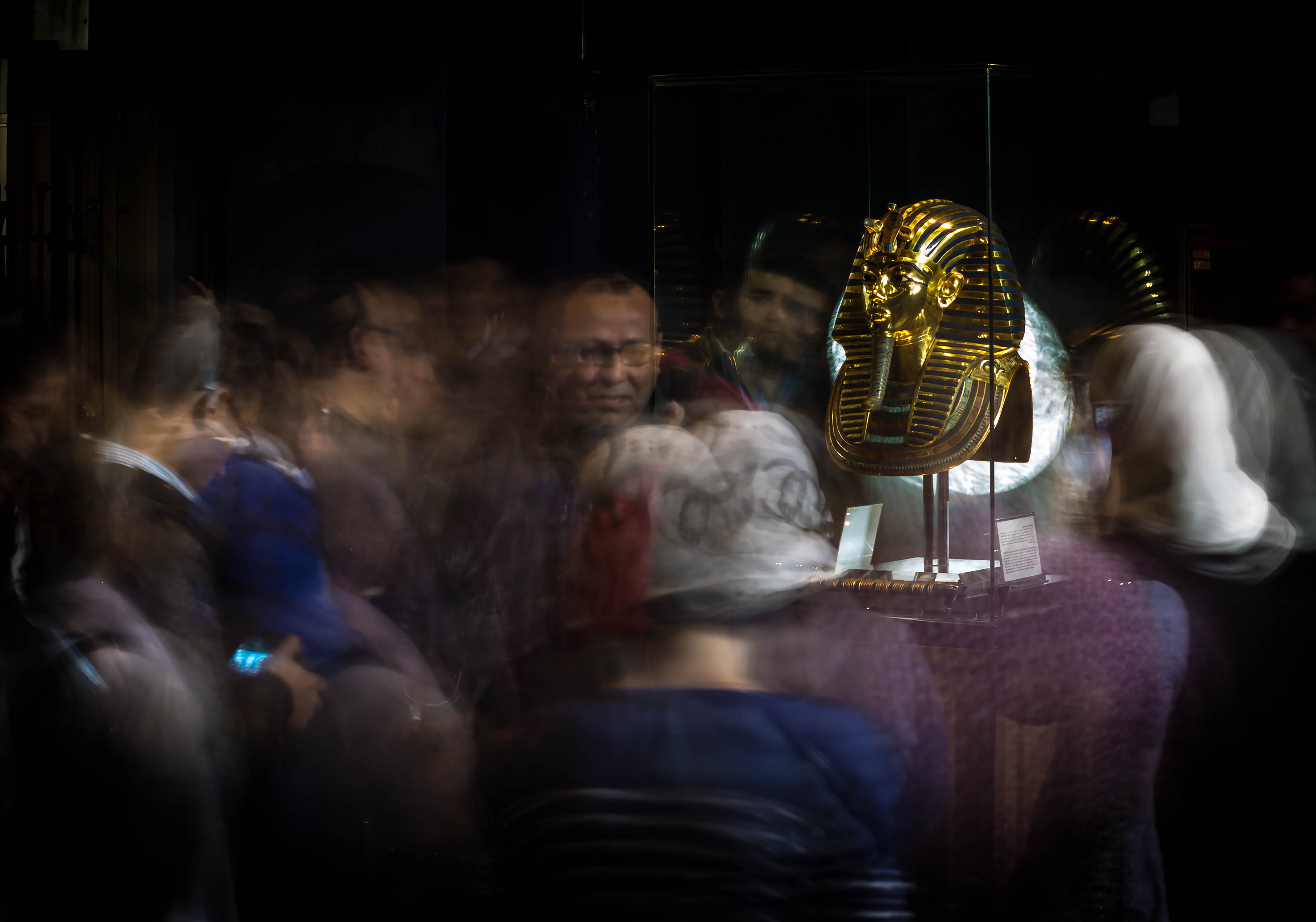 القناع الجنائزى للملك توت عنخ أمون بالمتحف المصرى